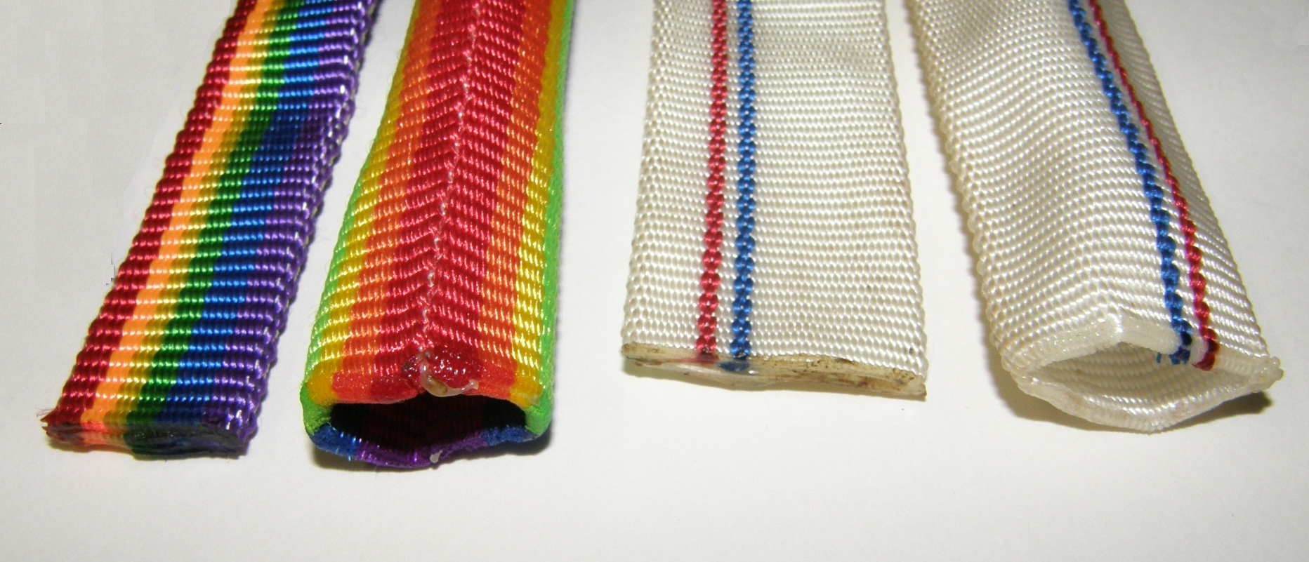 Verschmolzenes und geöffnetes Schlauchband